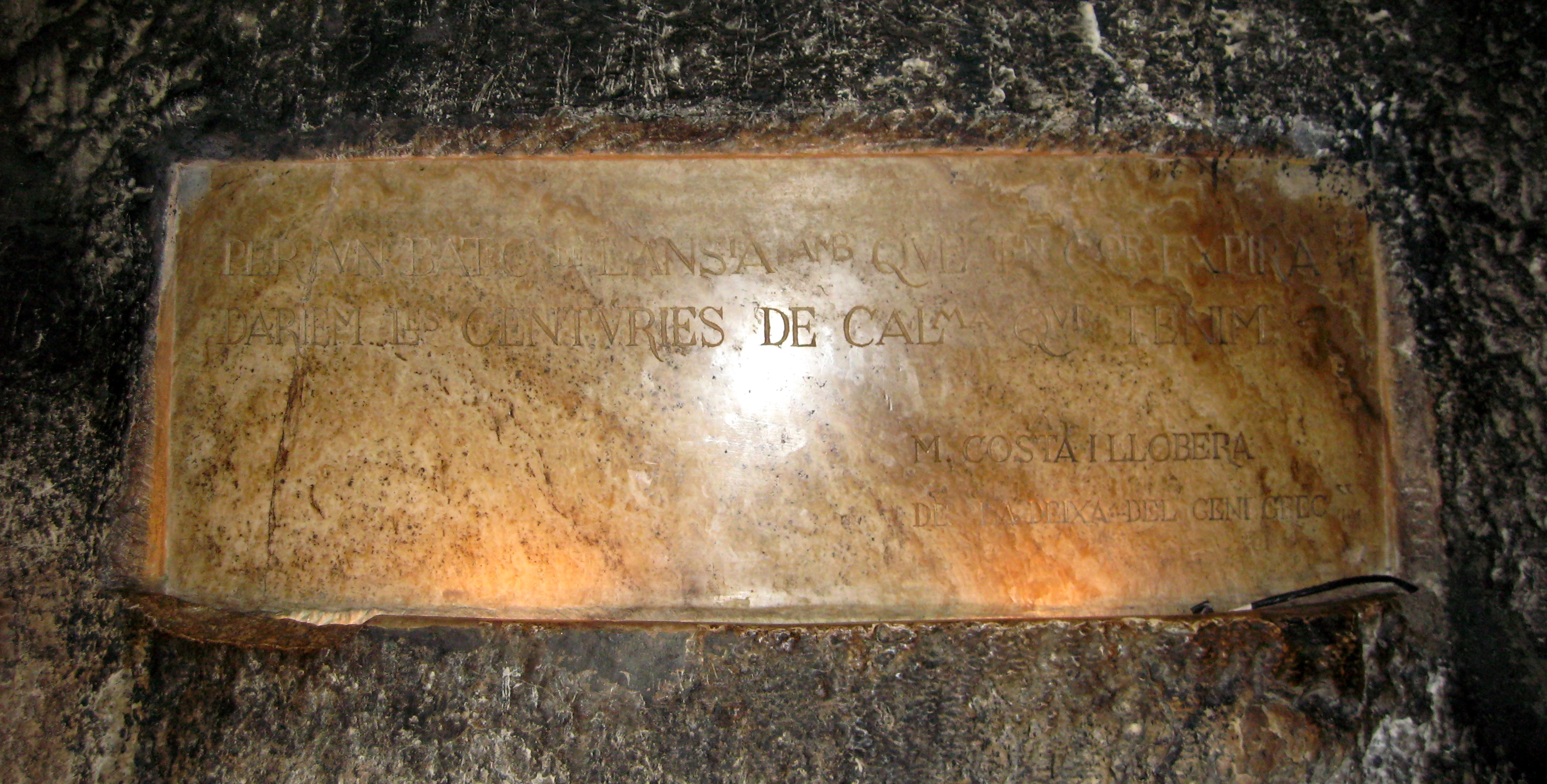 Coves d’Artà, Gemeinde Capdepera, Mallorca, Spanien